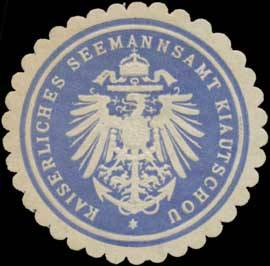 Sealing stamp Title: K. Seemannsamt Kiautschou Description: Marine, Militär Place: Kiautschou size: 4 cm